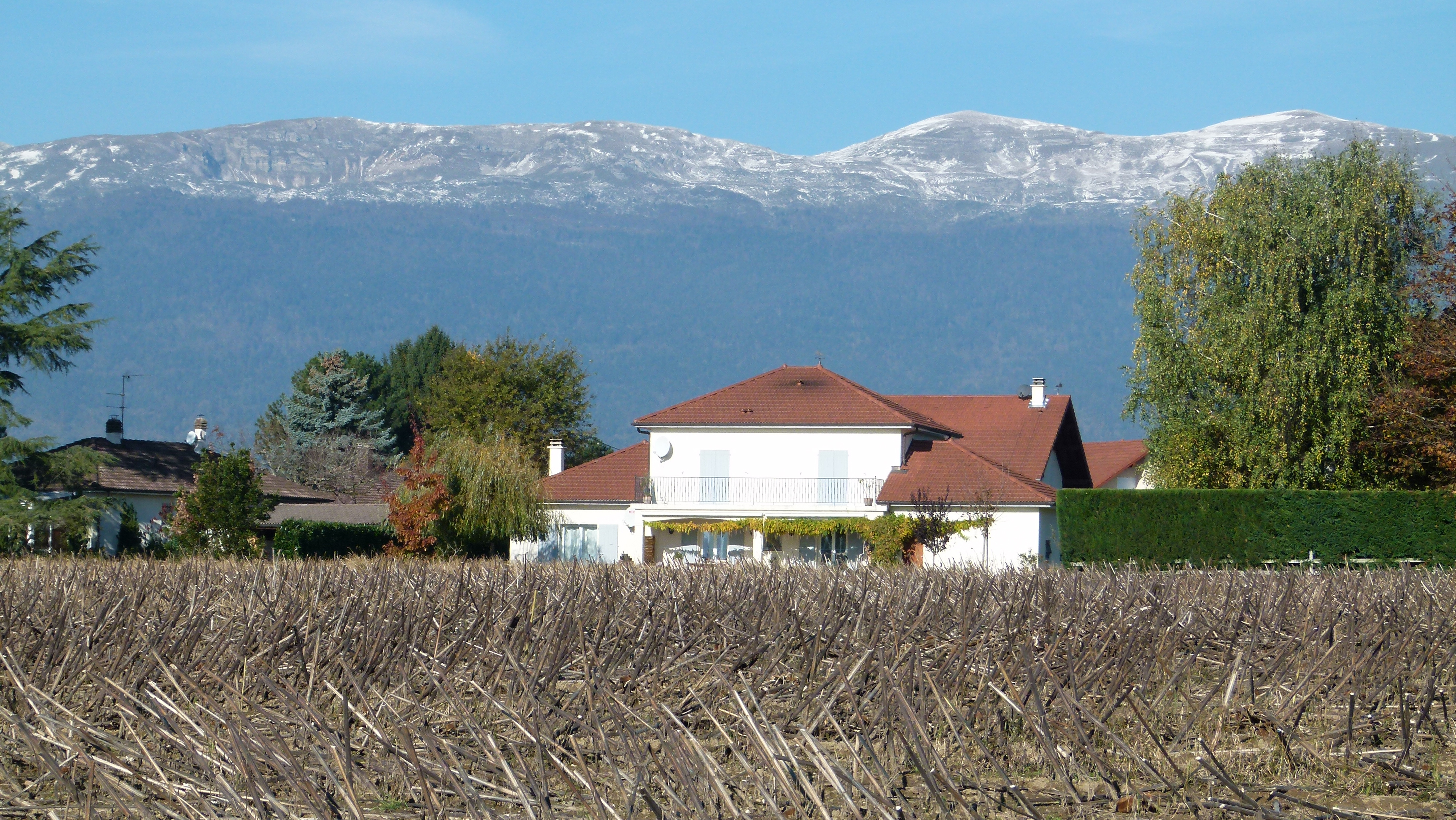 Blick auf den breiten Kamm des Colomby de Gex, von Prévessin-Moëns aus fotografiert